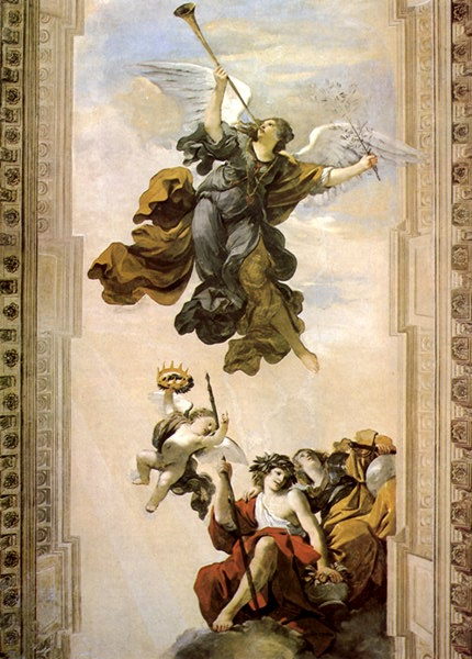 Fama, Onore e Virtù